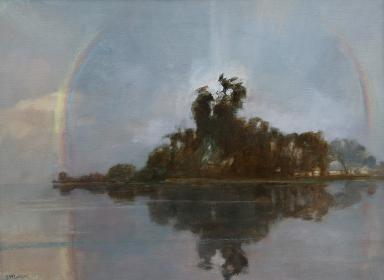 Stanisław Mazuś "Krajobraz z tęczą", 73x100 cm, 1999